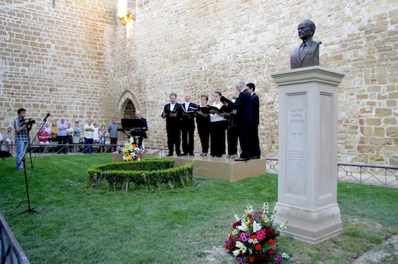 Busto a Antonio Parra